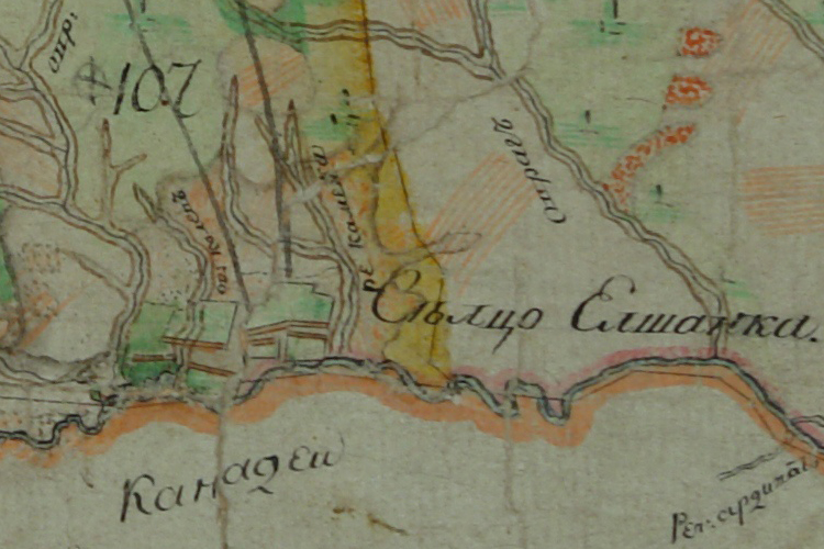 Сельцо Елшанка на двухверстной карте Симбирской губернии Сызранского уезда 1806 г.